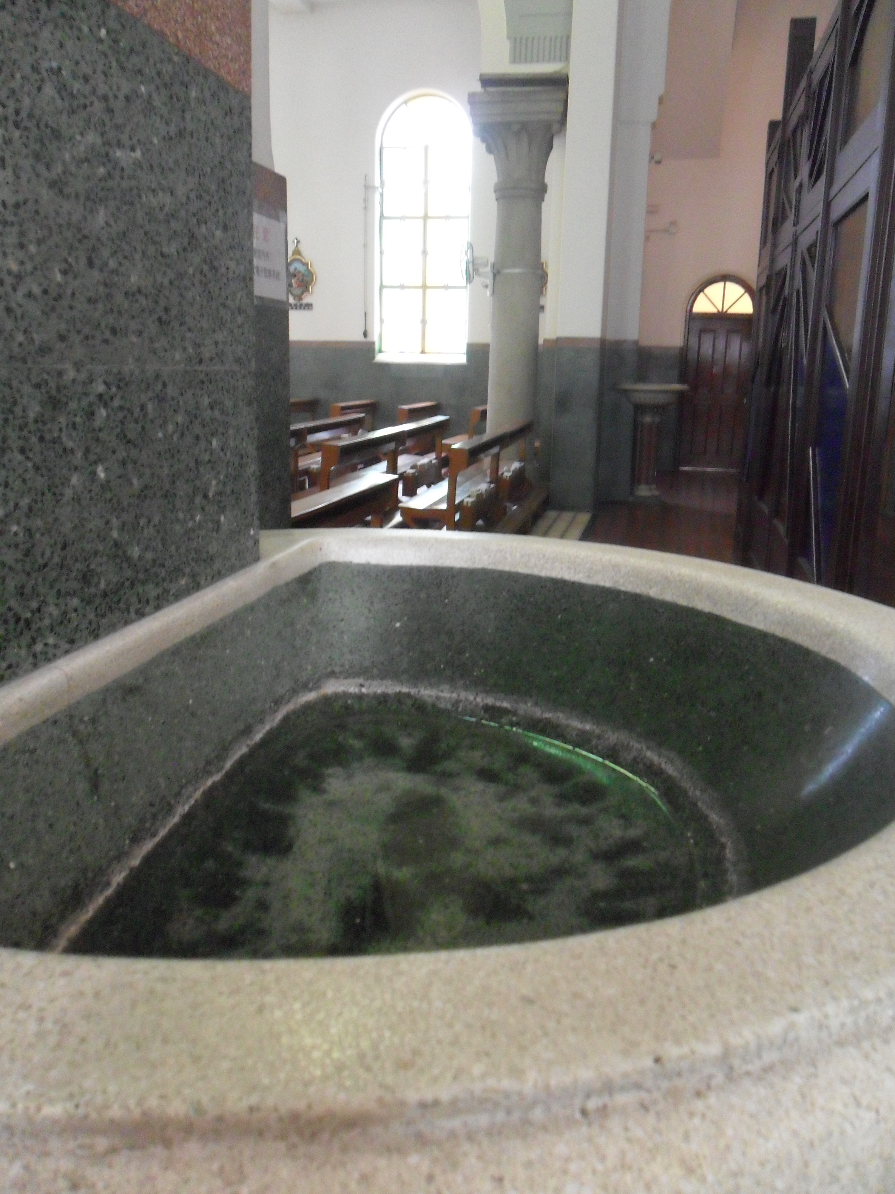 中文（香港）: 聖德肋撒堂, 香港, 中國